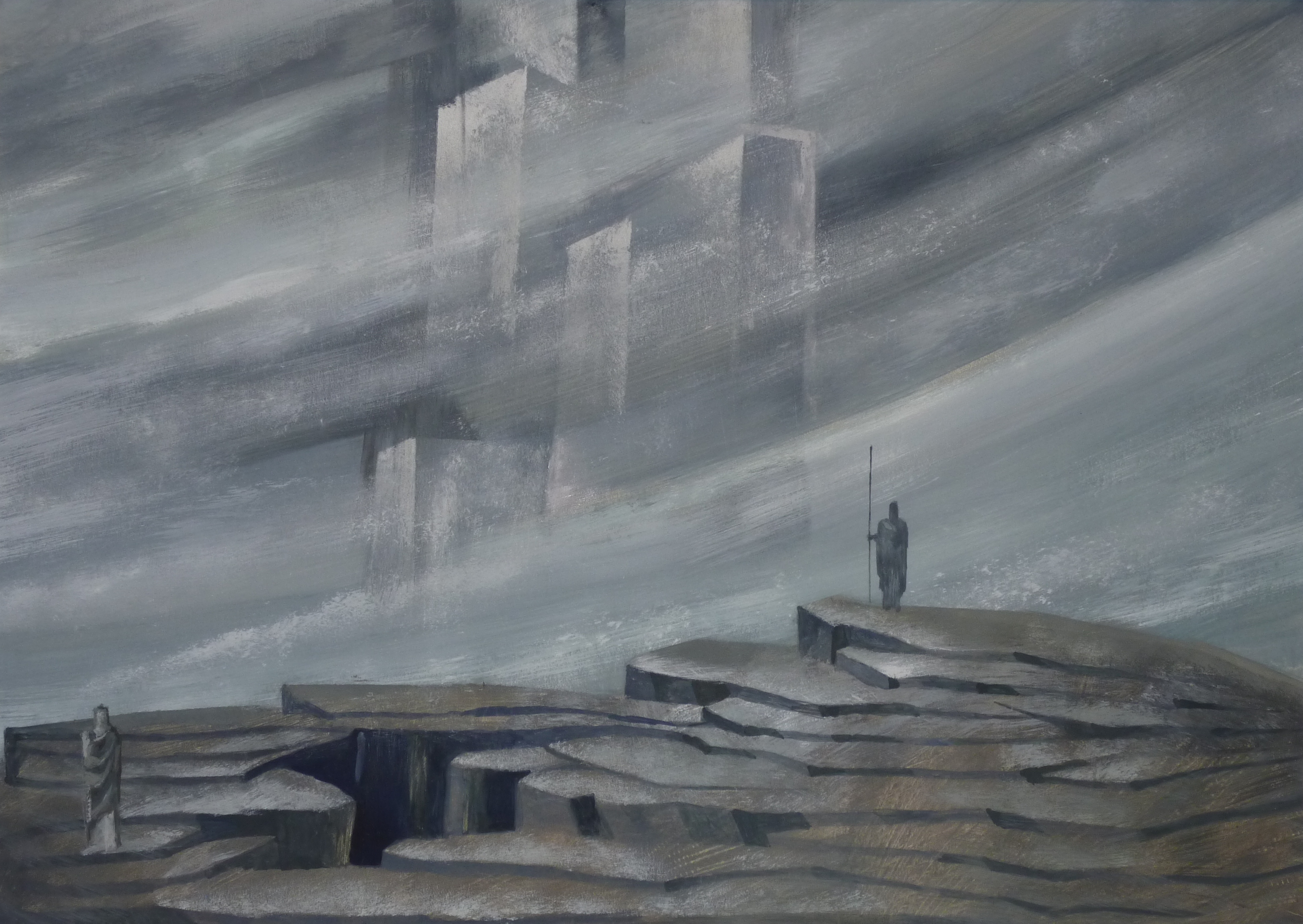 Bühnenbildentwurf von Helmut Jürgens für "Rheingold" von R. Wagner, Aufführung München 1952